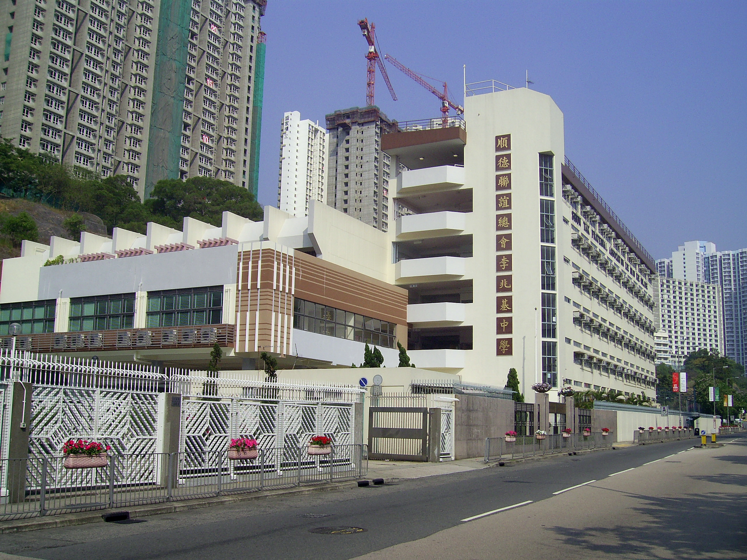 中文（香港）: 順德聯誼總會李兆基中學